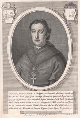 Der Kardinal und Bischof von Palestrina Luigi Amat di San Filippo e Sorso (1796-1878)